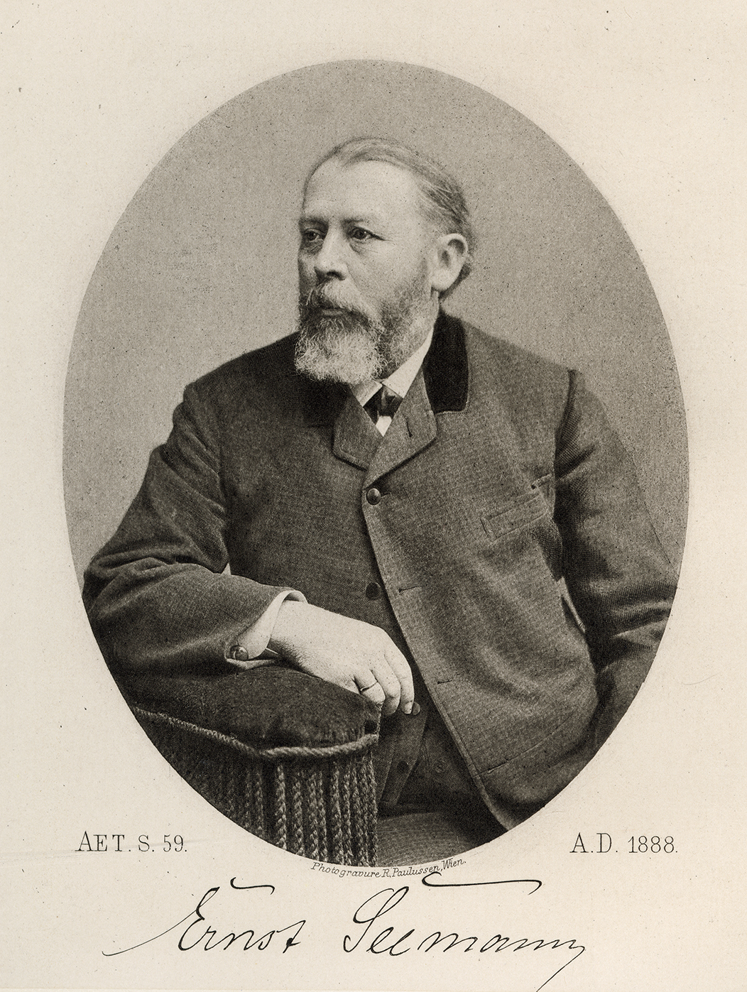 Ernst Arthur Seemann, Heliogravur von R. Paulussen, 1888